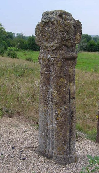 La croix romane de Grisy à Vendeuvre, près de Saint-Pierre-sur-Dives (Calvados) Auteur : Osbern Catégorie : art, religion